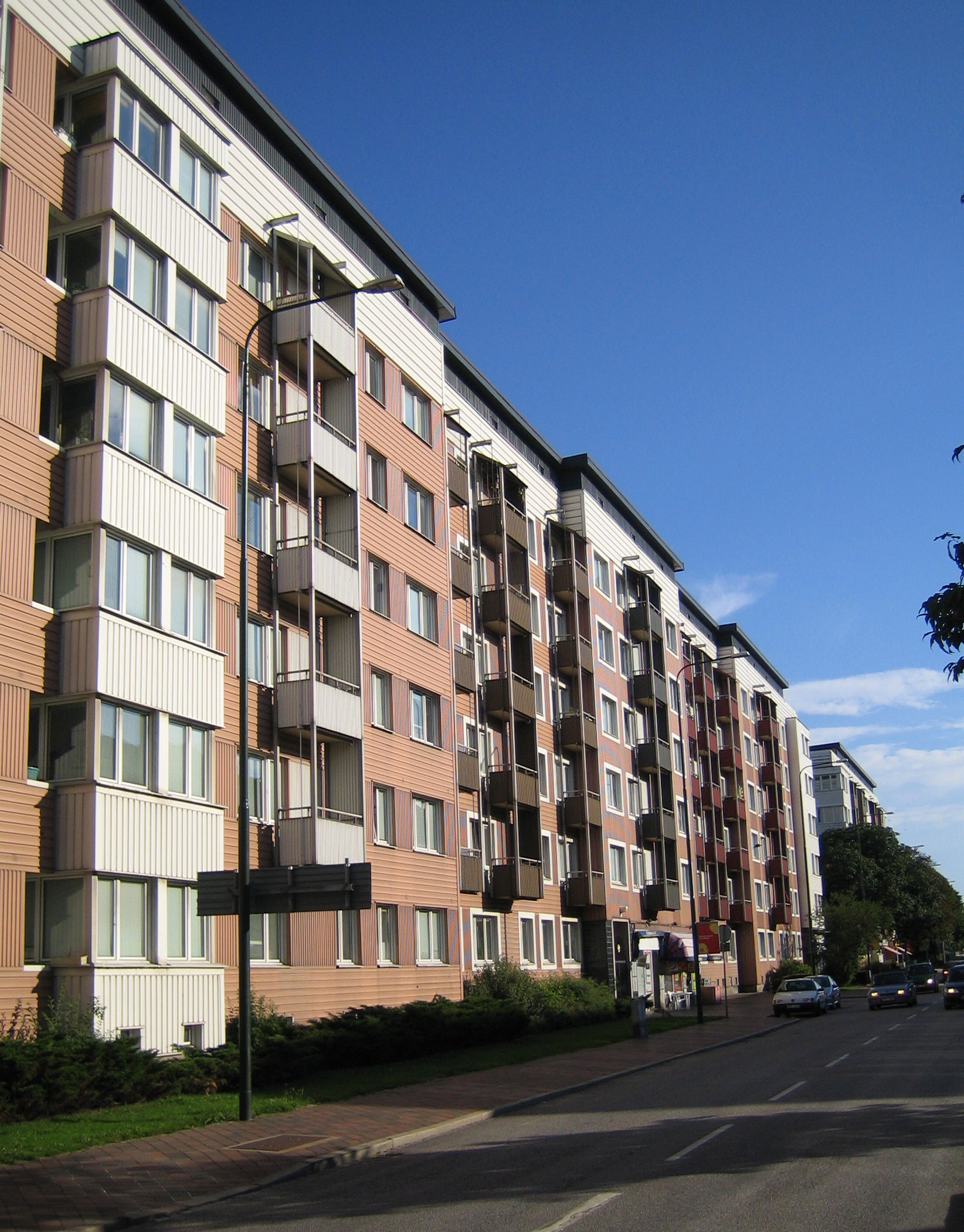 Ellstorp in Malmö, Sweden.